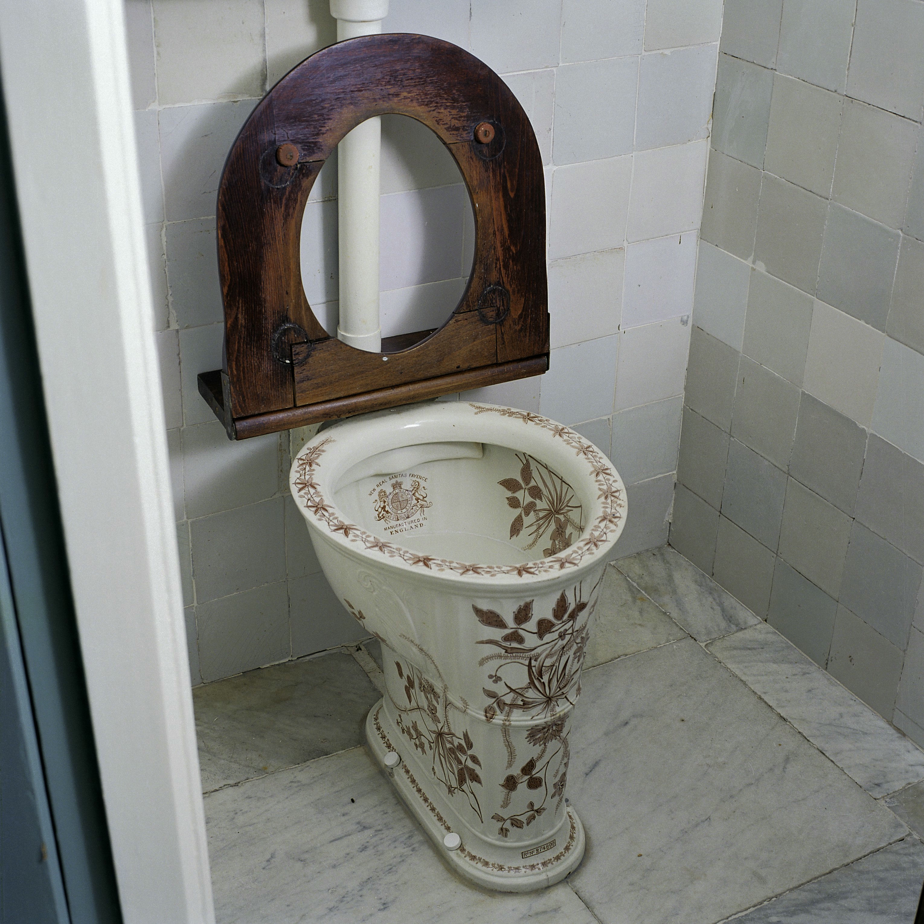 Trompenburg: Interieur bel-etage, gedecoreerde toiletpot in toilet